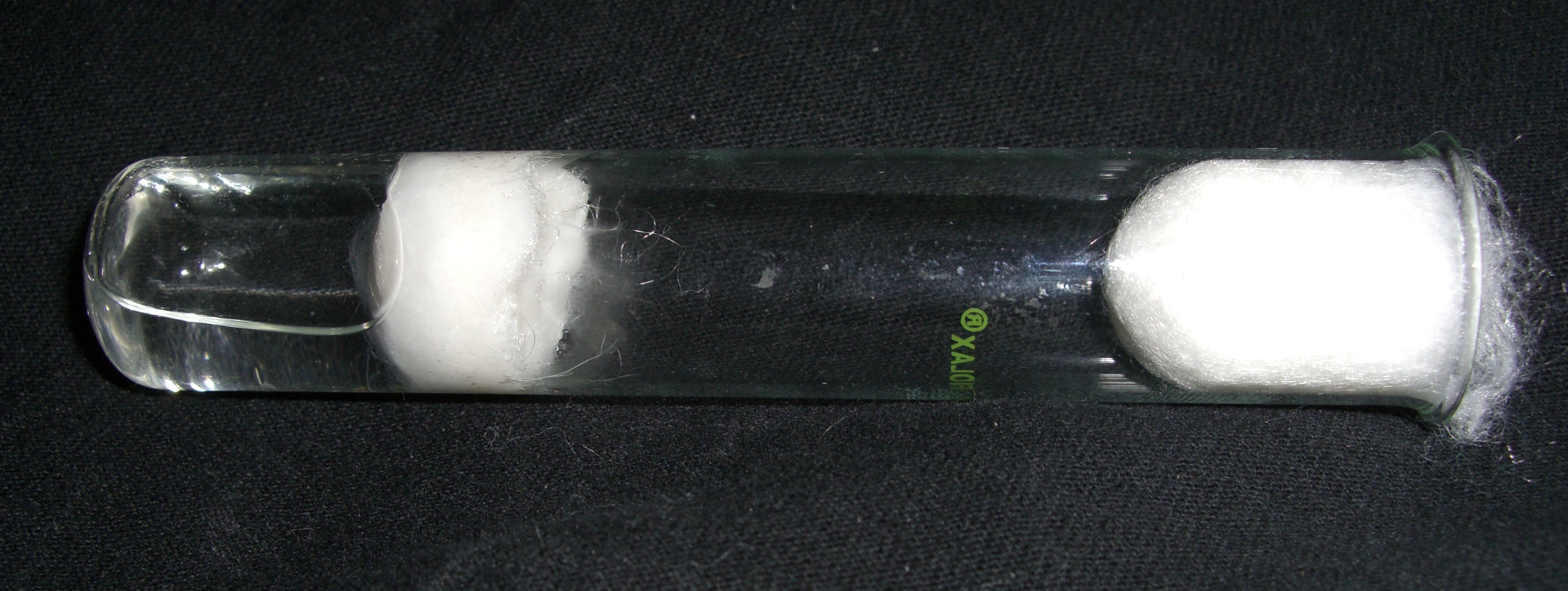 Culture tube prepared for formicidae